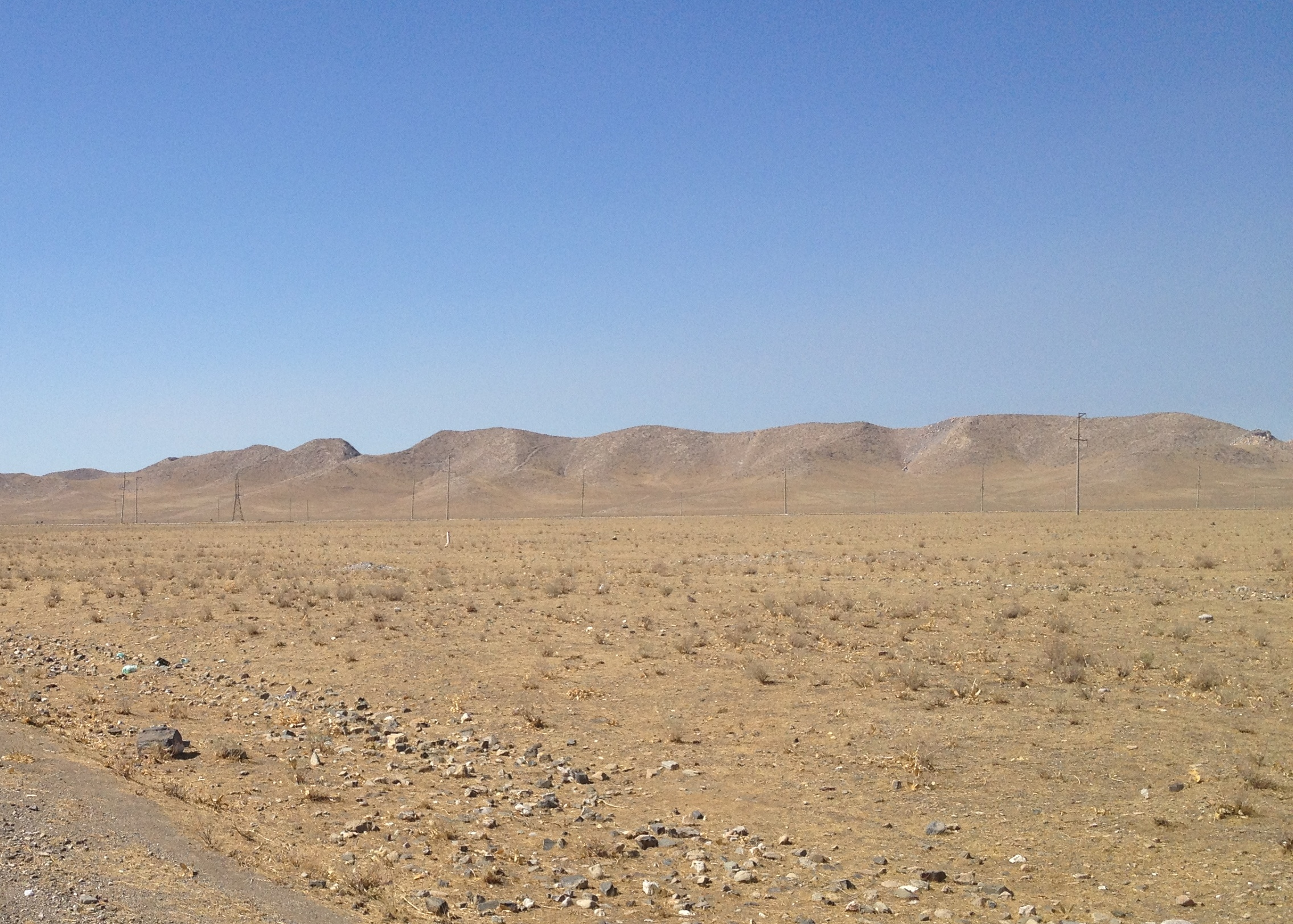 Горный хребет Эгарберлитаг